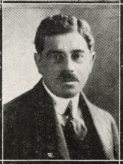 Antonio Pinto Durán, abogado y político chileno.